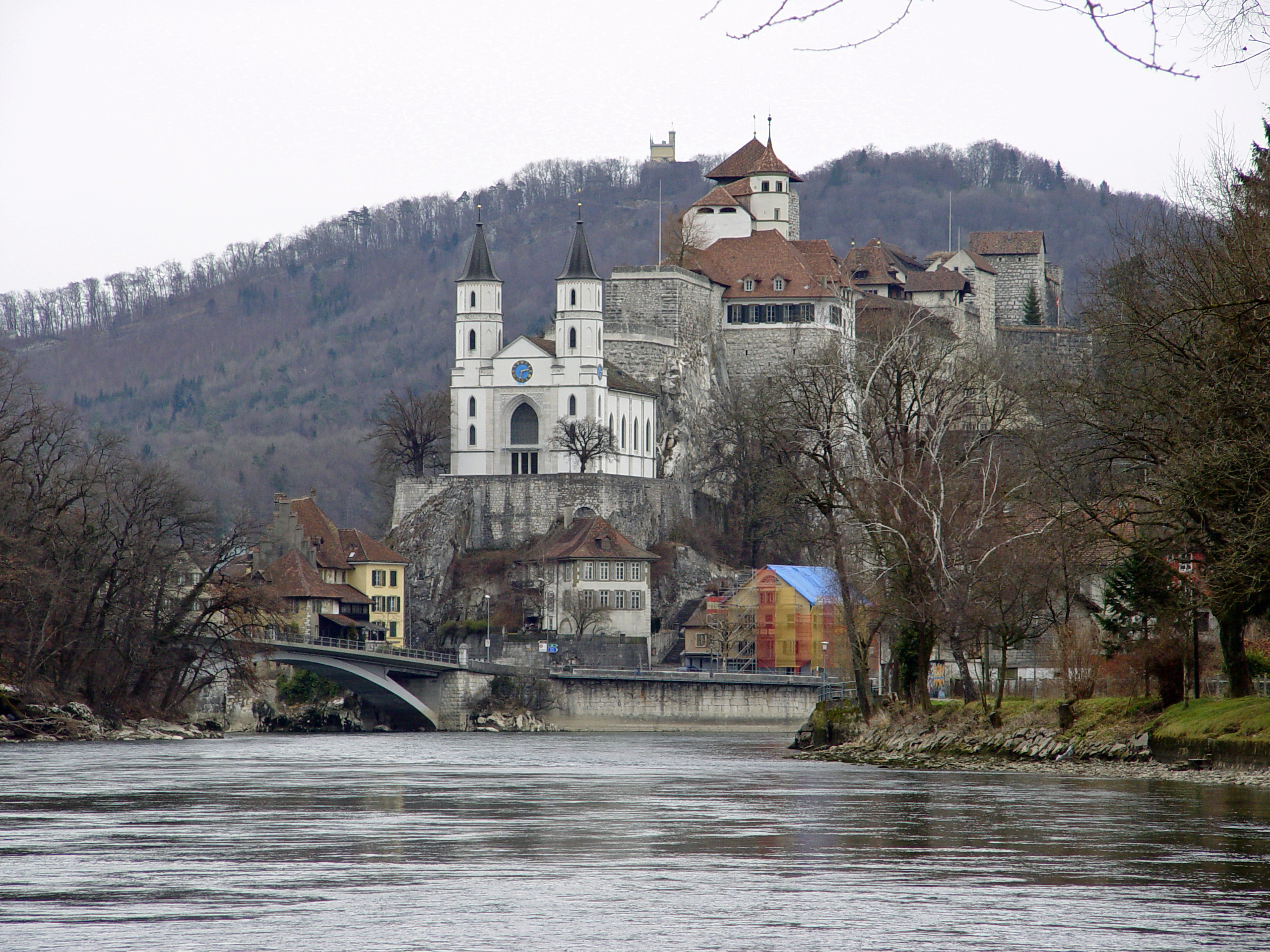 Aarburg von der Aare gesehen